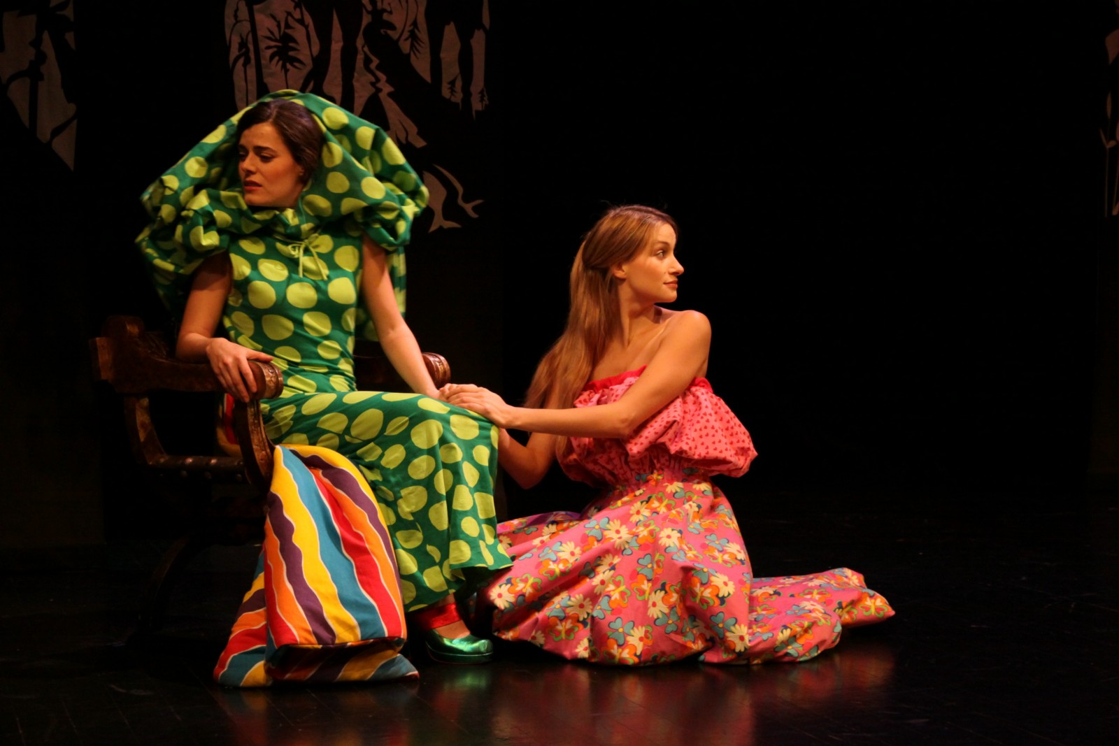 Les deux sœurs, extrait du spectacle